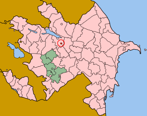 Map of Azerbaijan showing Yevlakh (Yevlax) sahar.